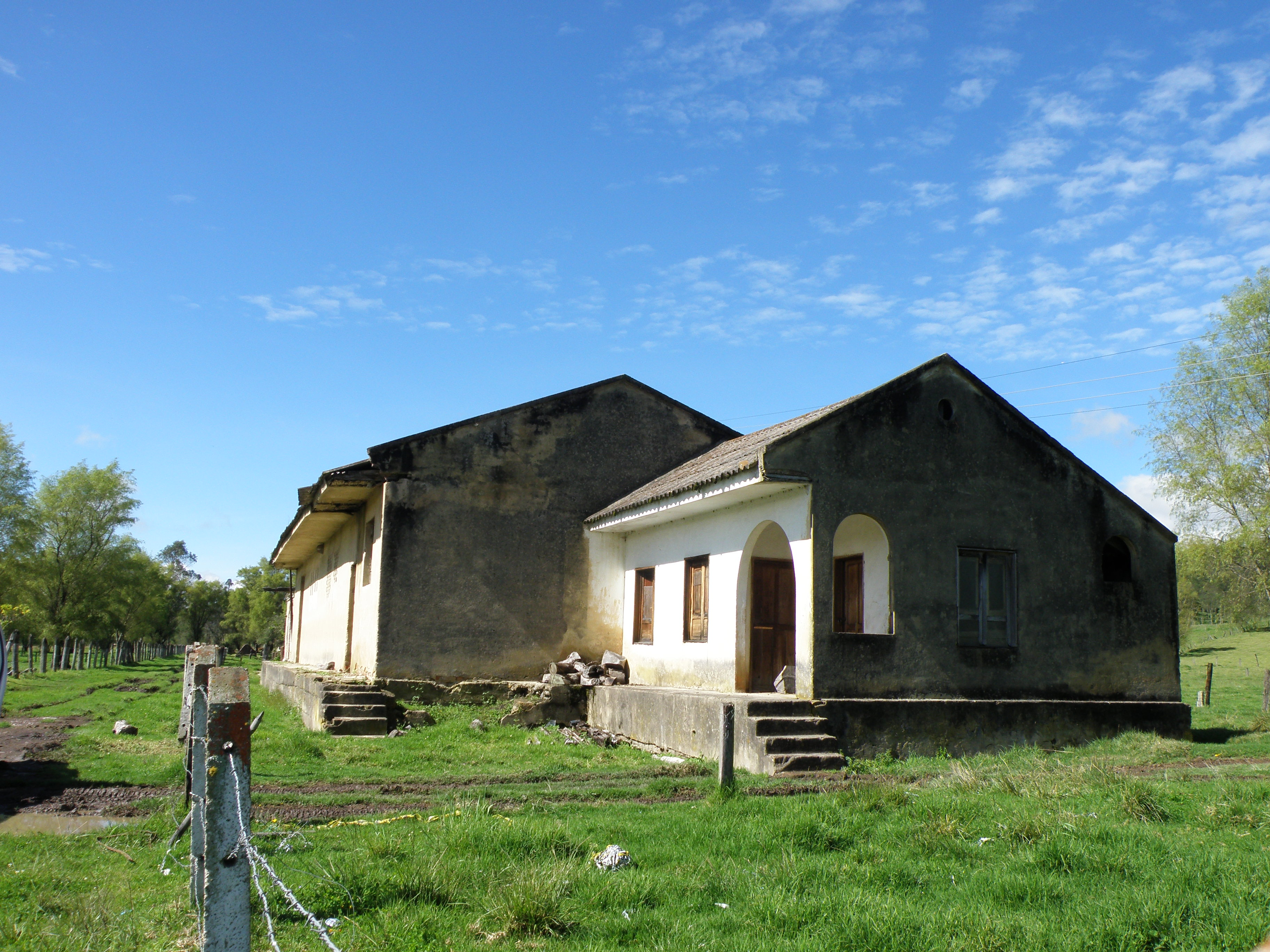 Estación del Ferrocarril Saboyá